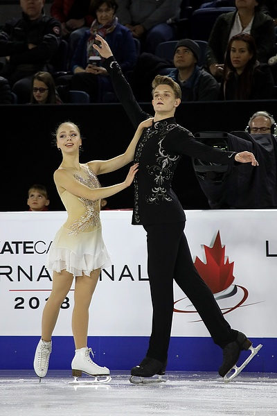 Александра Бойкова и Дмитрий Козловский на этапе Гран-при Skate Canada 2018